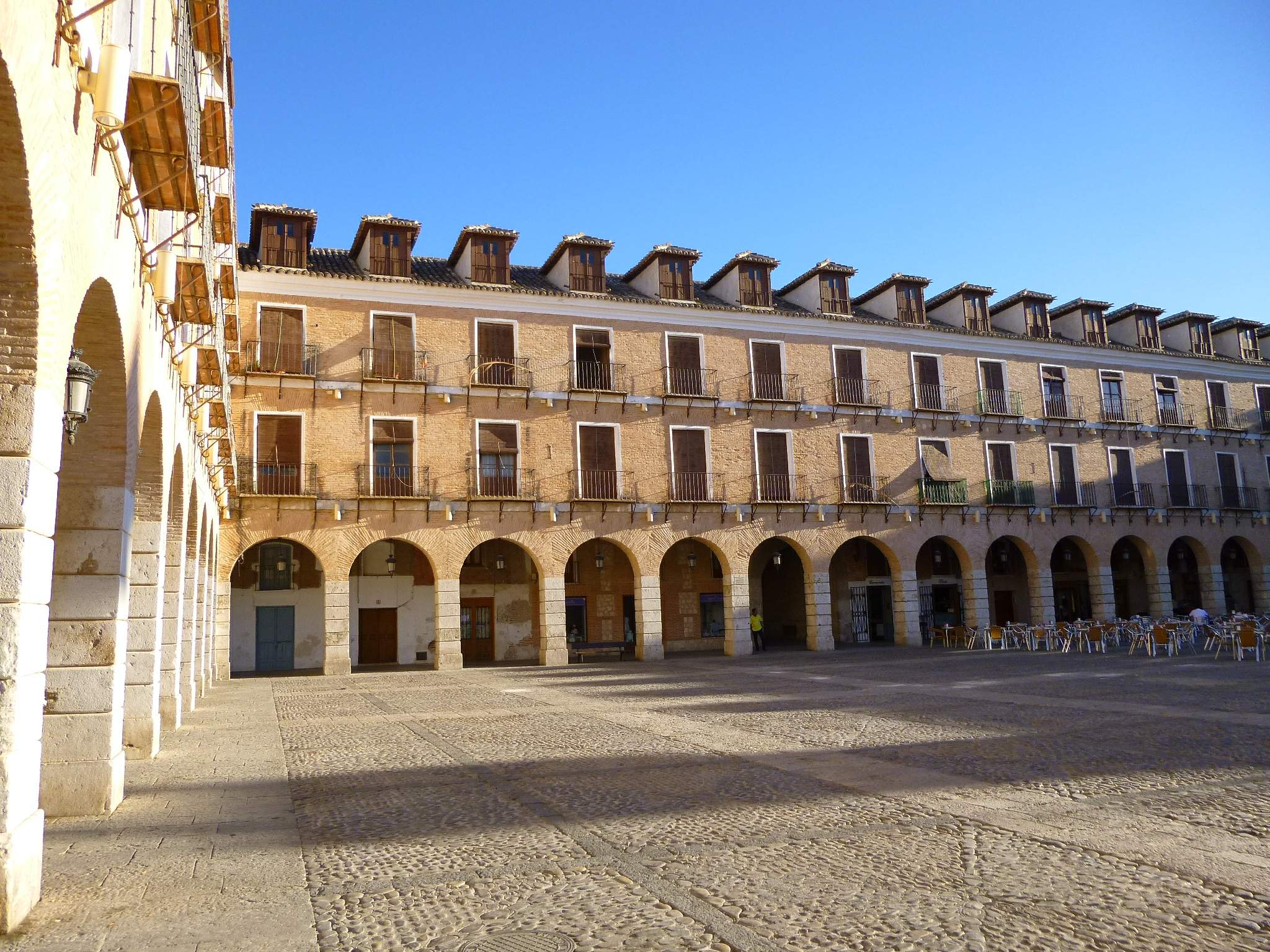 Plaza Mayor de Ocaña (Toledo)